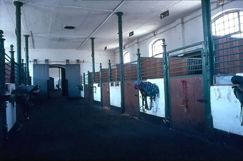 Stall 1 Westfälische Reit- und Fahrschule 1984